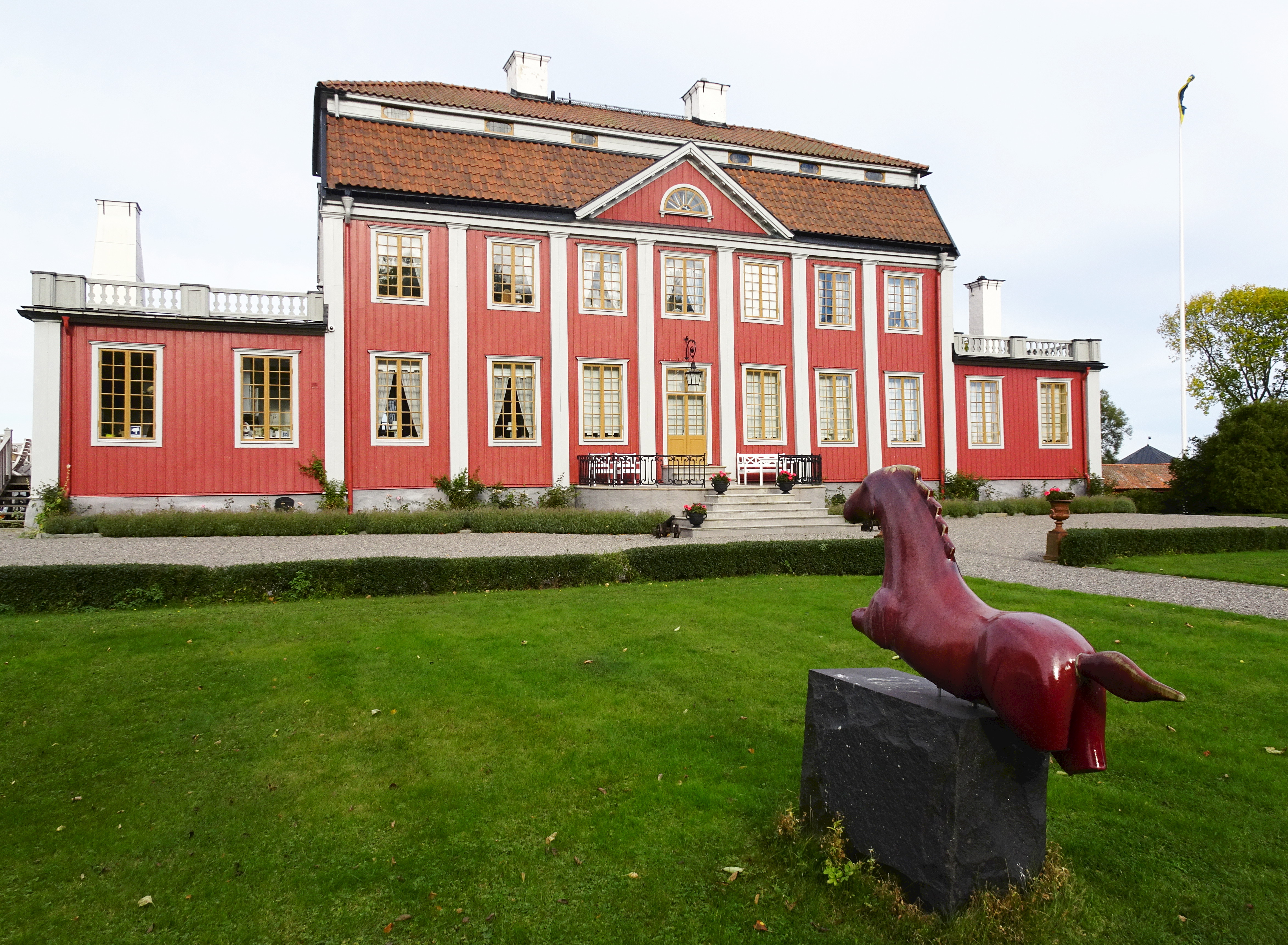 Horns säteri, huvudbyggnad med Ulla Kraitz "Flyende häst"